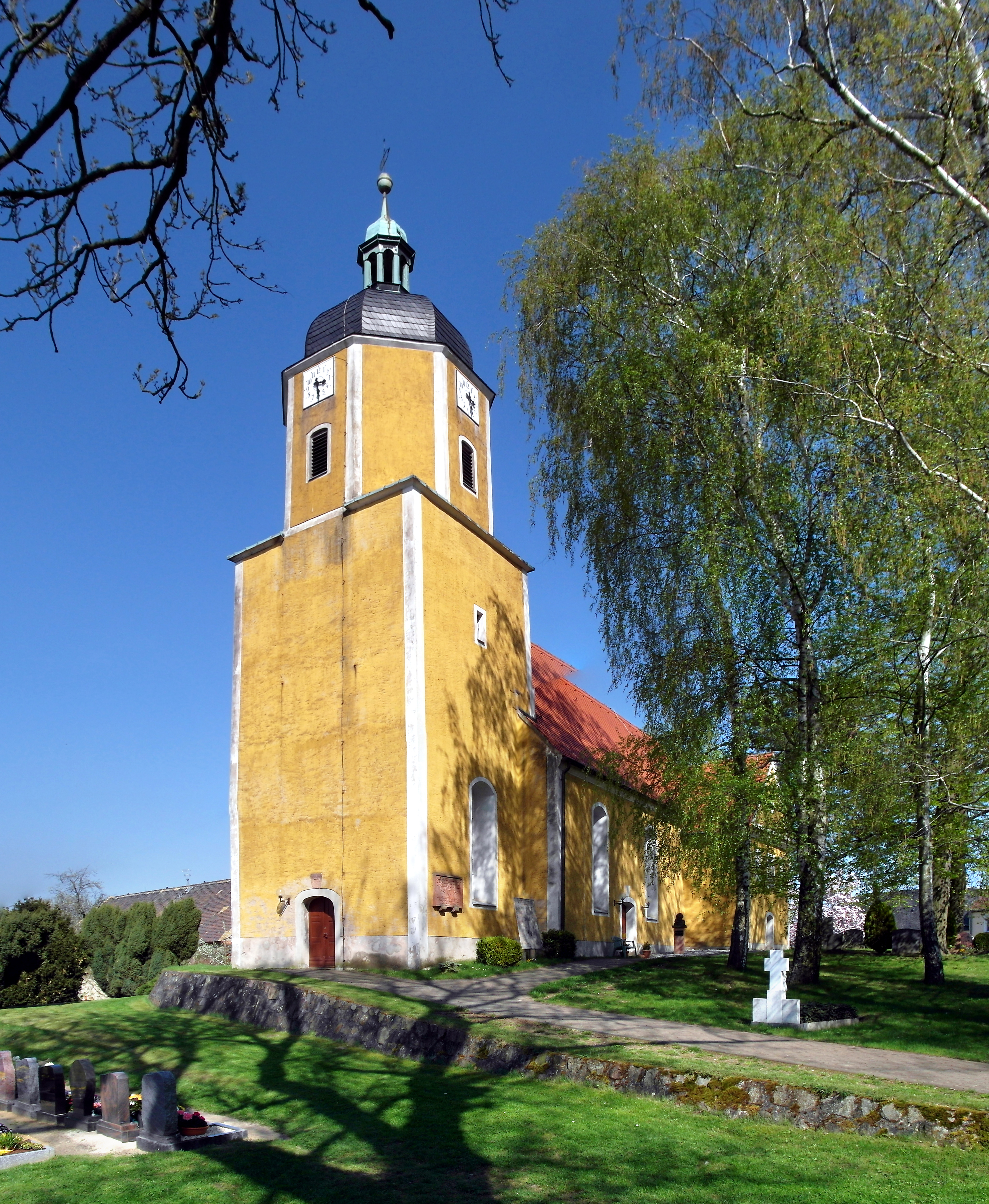 18.04.2018 04808 Böhlitz (Thallwitz): Martin-Luther-Kirche Böhlitz, Am alten Teich (GMP: 51.441089,12.750612). Seit dem 11. Jahrhundert gab es an dieser Stelle einen kleineren Vorgängerbau. 1799 riß man die alte Kirche ab und erbaute die neue Kirche, die schon im selben Jahr, zu Luthers Geburtstag am 10. November 1799, geweiht wurde. [SAM5387+5393.JPG]20180418455MDR.JPG(c)Blobelt